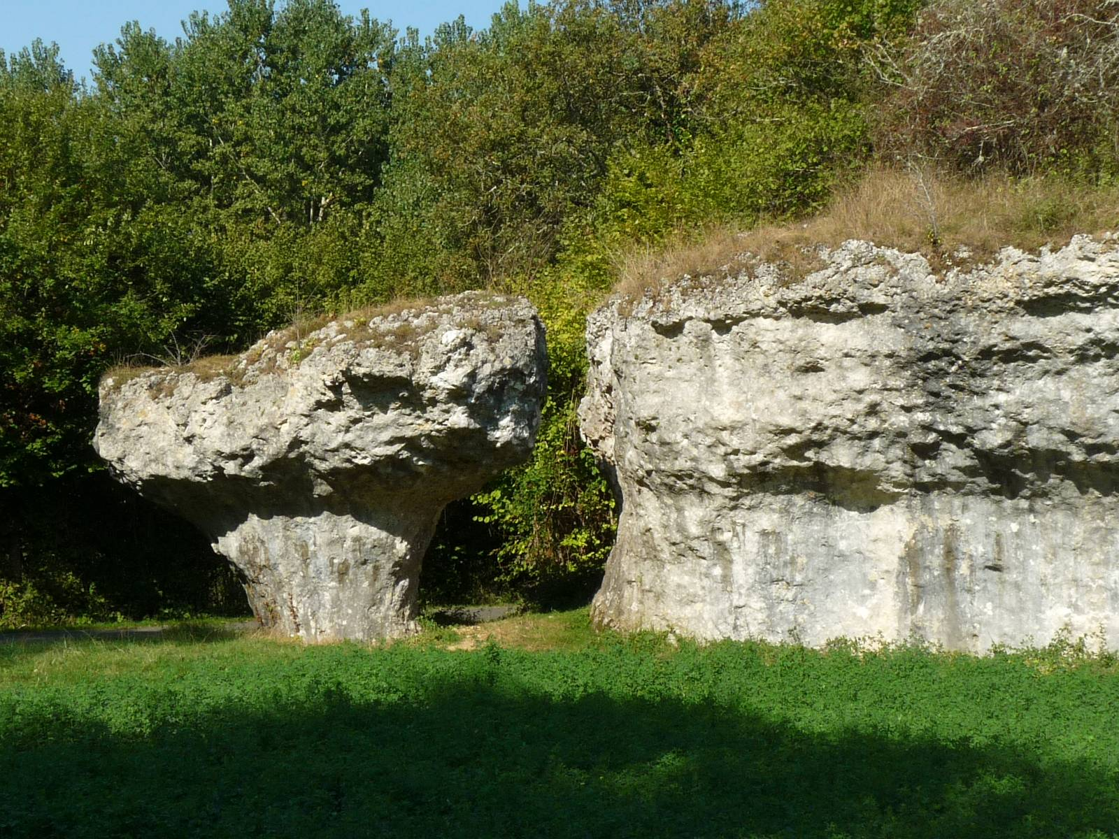 rocher dans la vallée du Voultron, à Gardes-le-Pontaroux (16), France